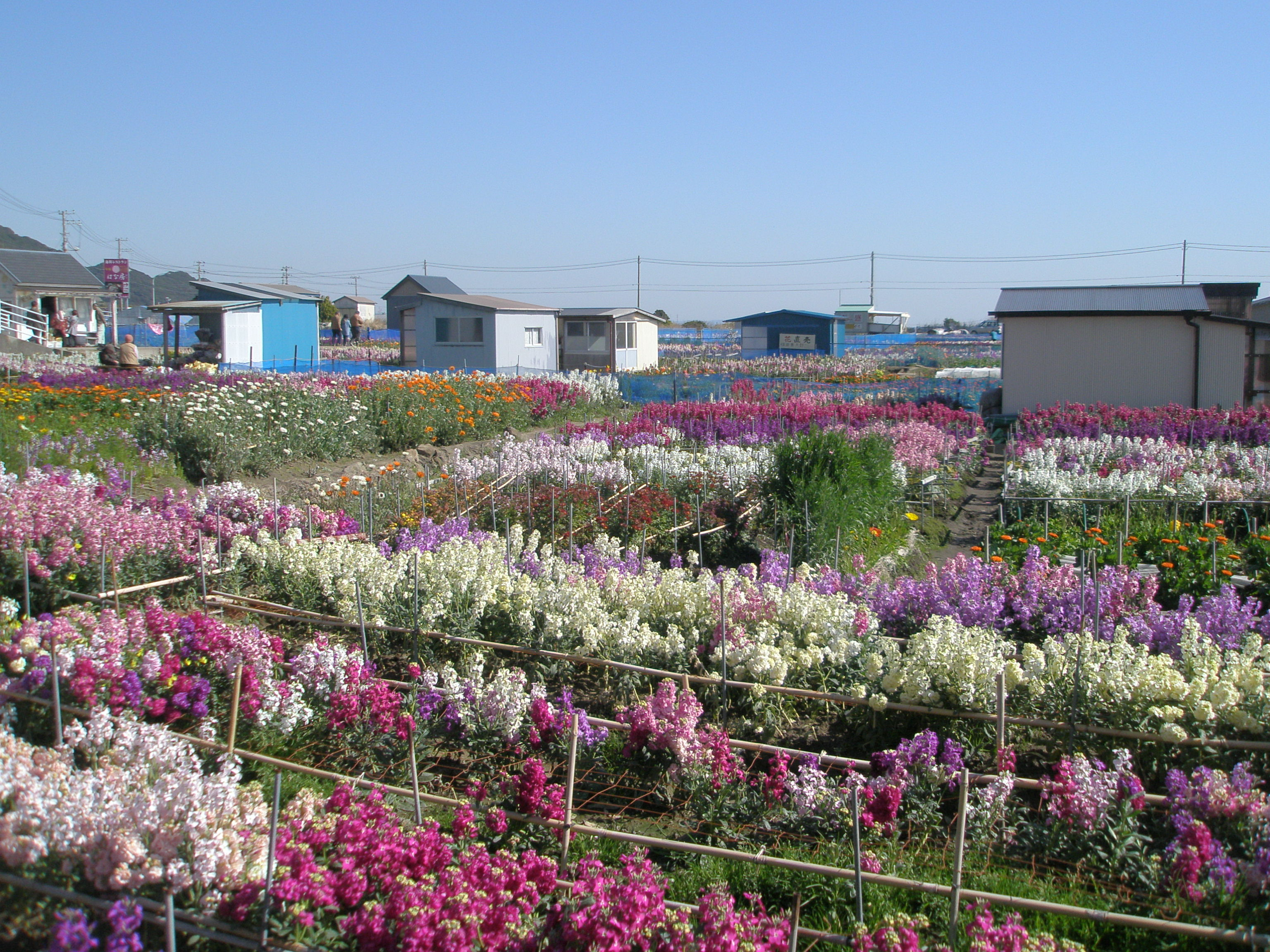 千葉県南房総市千倉、白間津のお花畑